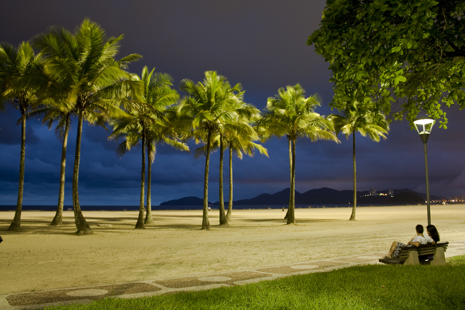 Fim de tarde em Santos, SP, Brasil.